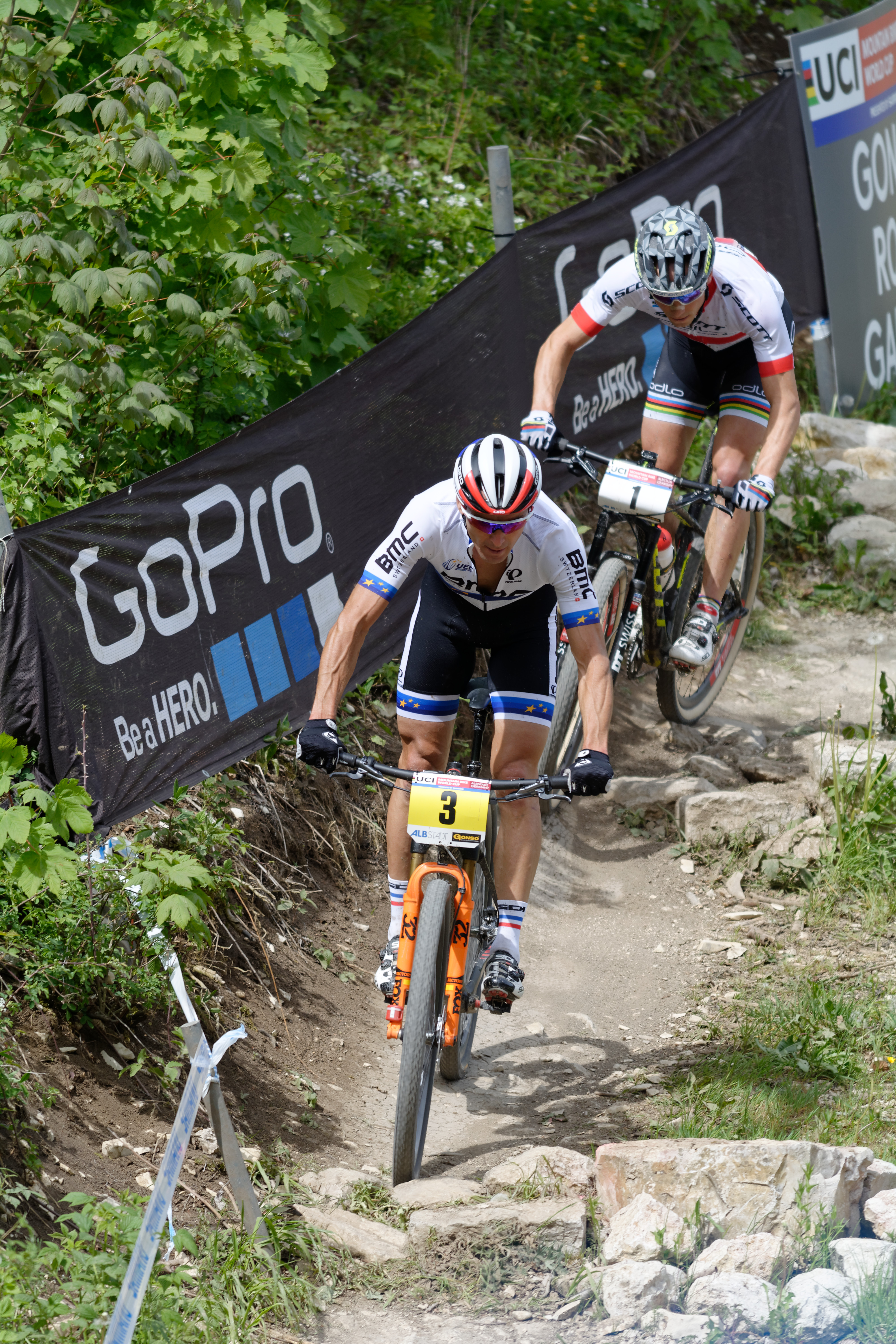 D71_7304_DxO